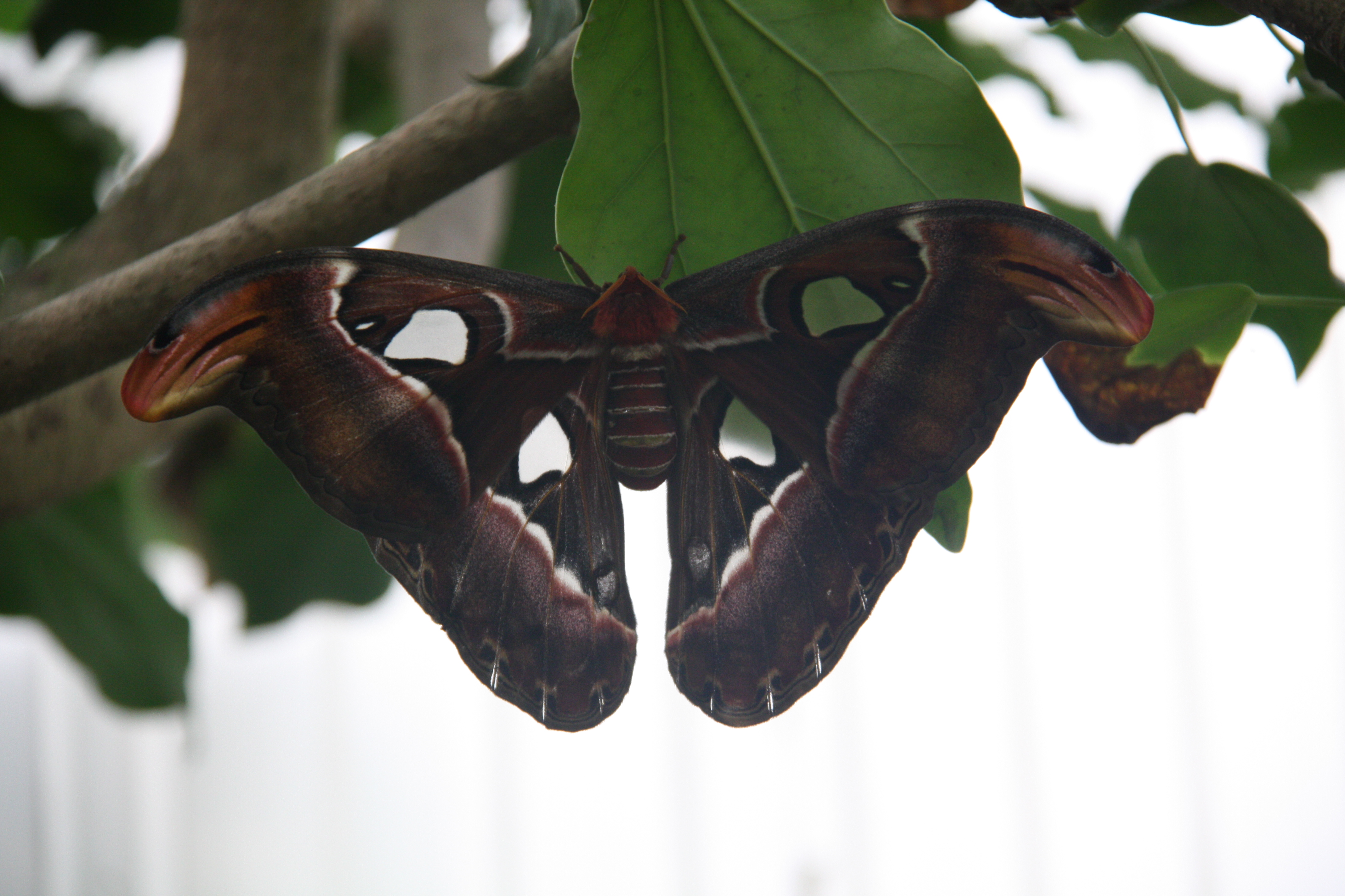 Atlasvlinder in het Dierenpark Emmen